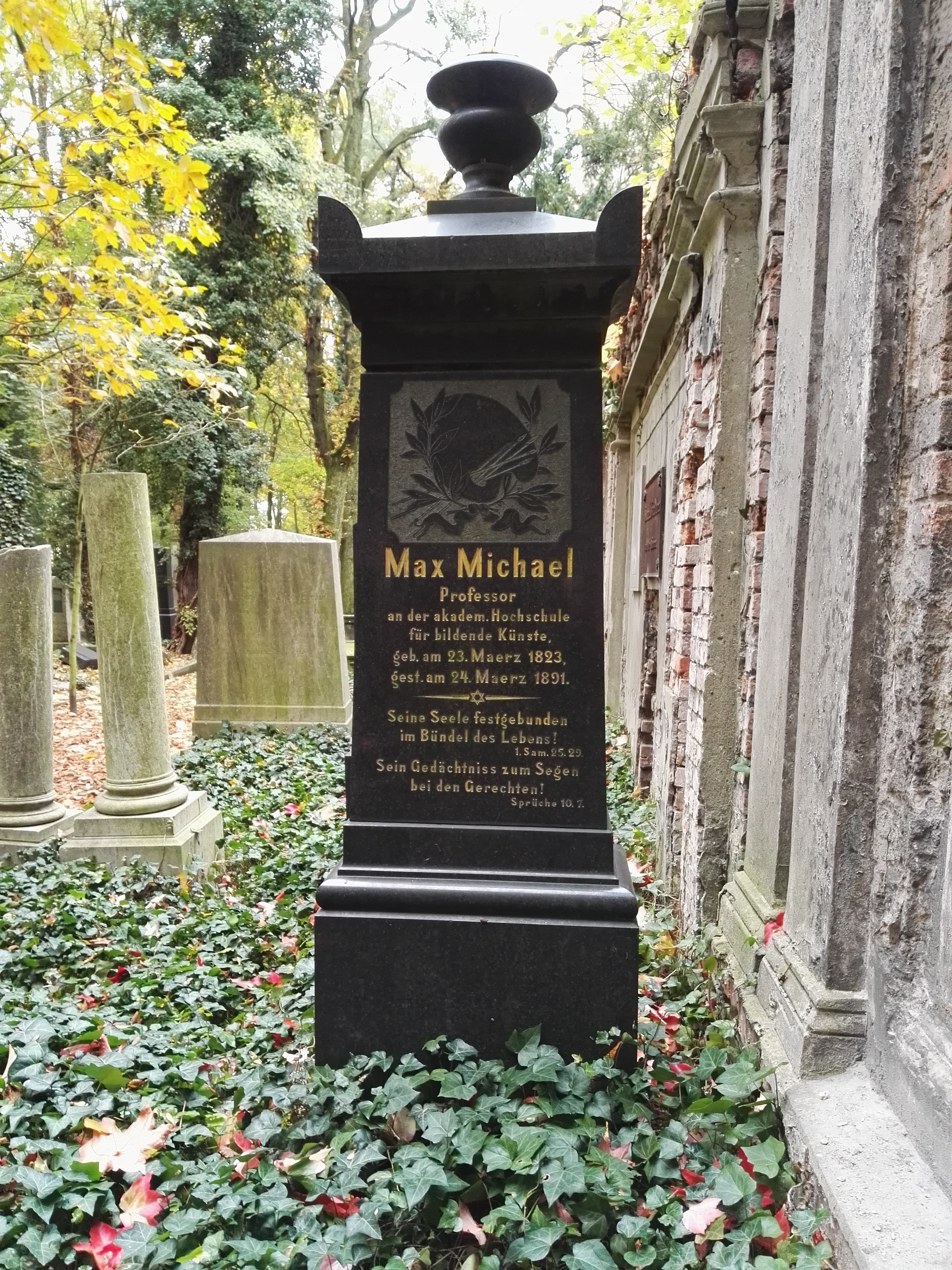 Grab von Prof. Max Michael auf dem Jüdischer Friedhof Schönhauser Allee in Berlin-Prenzlauer Berg